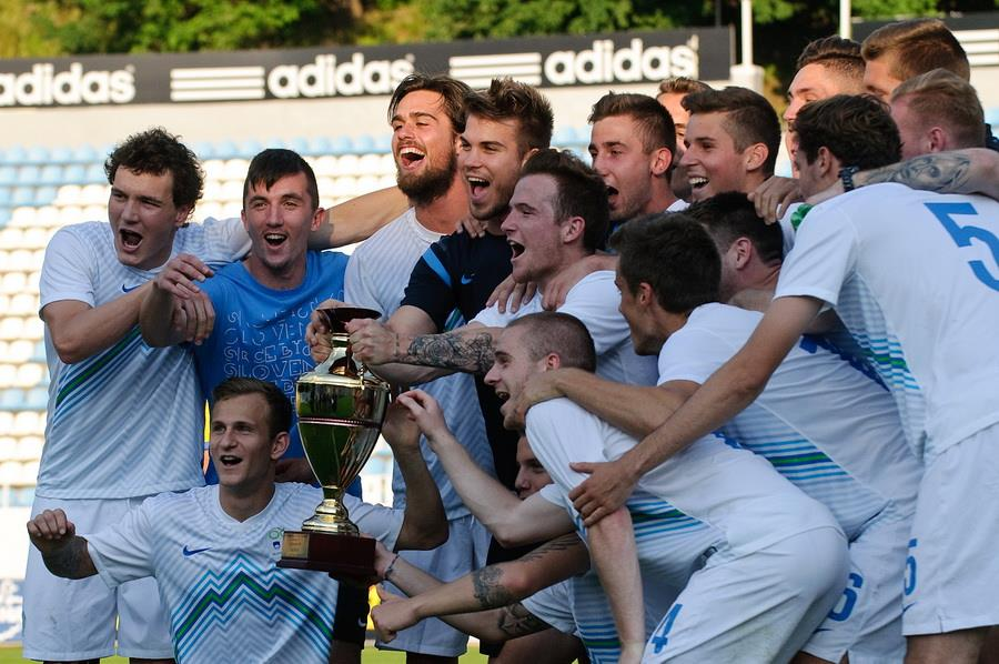 Молодіжна збірна Словенії після перемоги у фіналі Турніру пам'яті Валерія Лобановського 2015